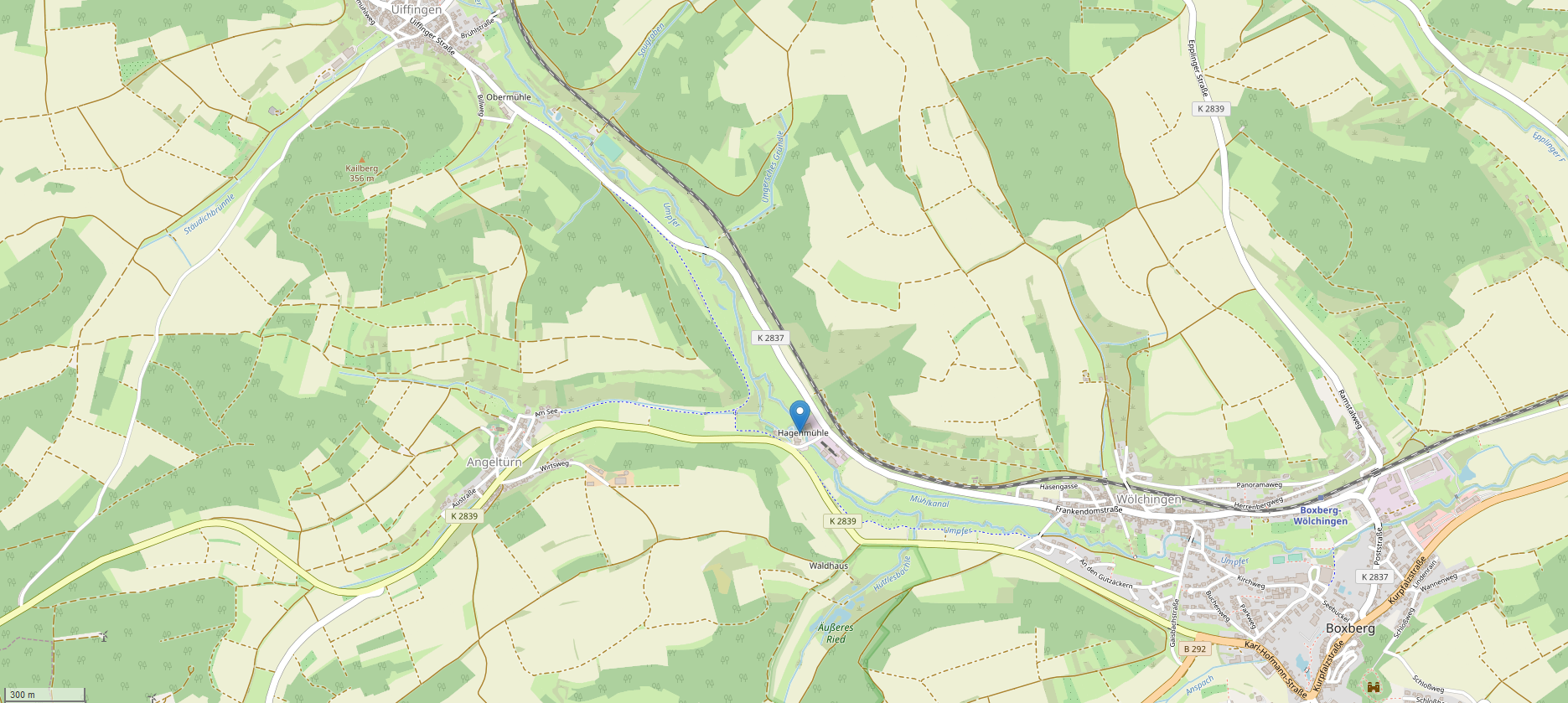 Lage des Wohnplatzes Hagenmühle auf der Gemarkung von Uiffingen (Boxberg)